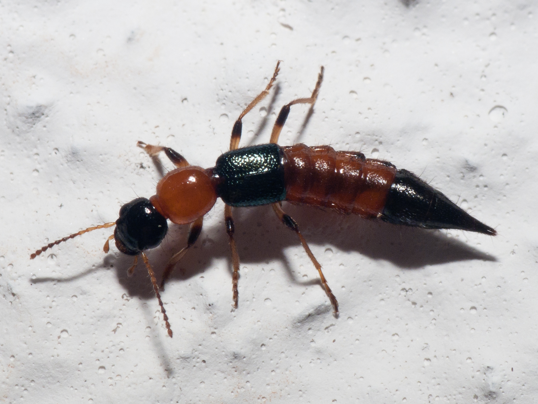 Paederus littoralis. Soigrexa, Bastavales, Brión, Galicia.